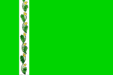 прапор Корюківського району